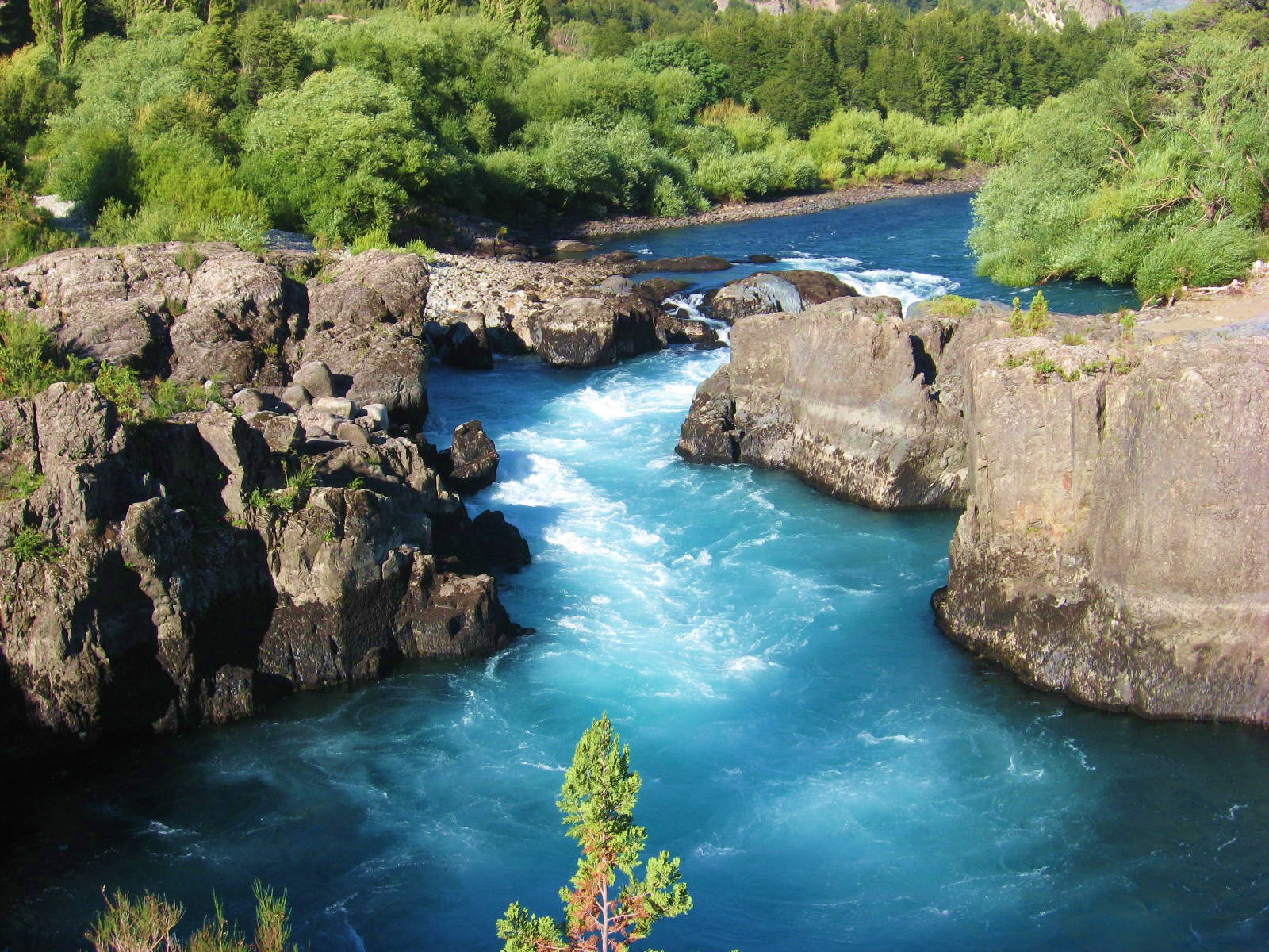 Fotografía del río Fuatleufú, ubicado en la comuna que lleva el mismo nombre, se encuentra en la Región de los Lagos, a 10 km de Argentina. Hermosos paisajes son los que cautivan y enamoran a todo quien visite y recorra esta localidad.